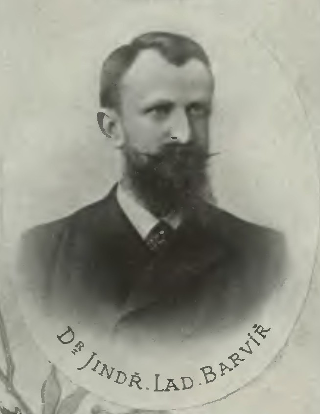 Portrét – Jindřich Ladislav Barvíř (1863-1952), Český geolog a historik.